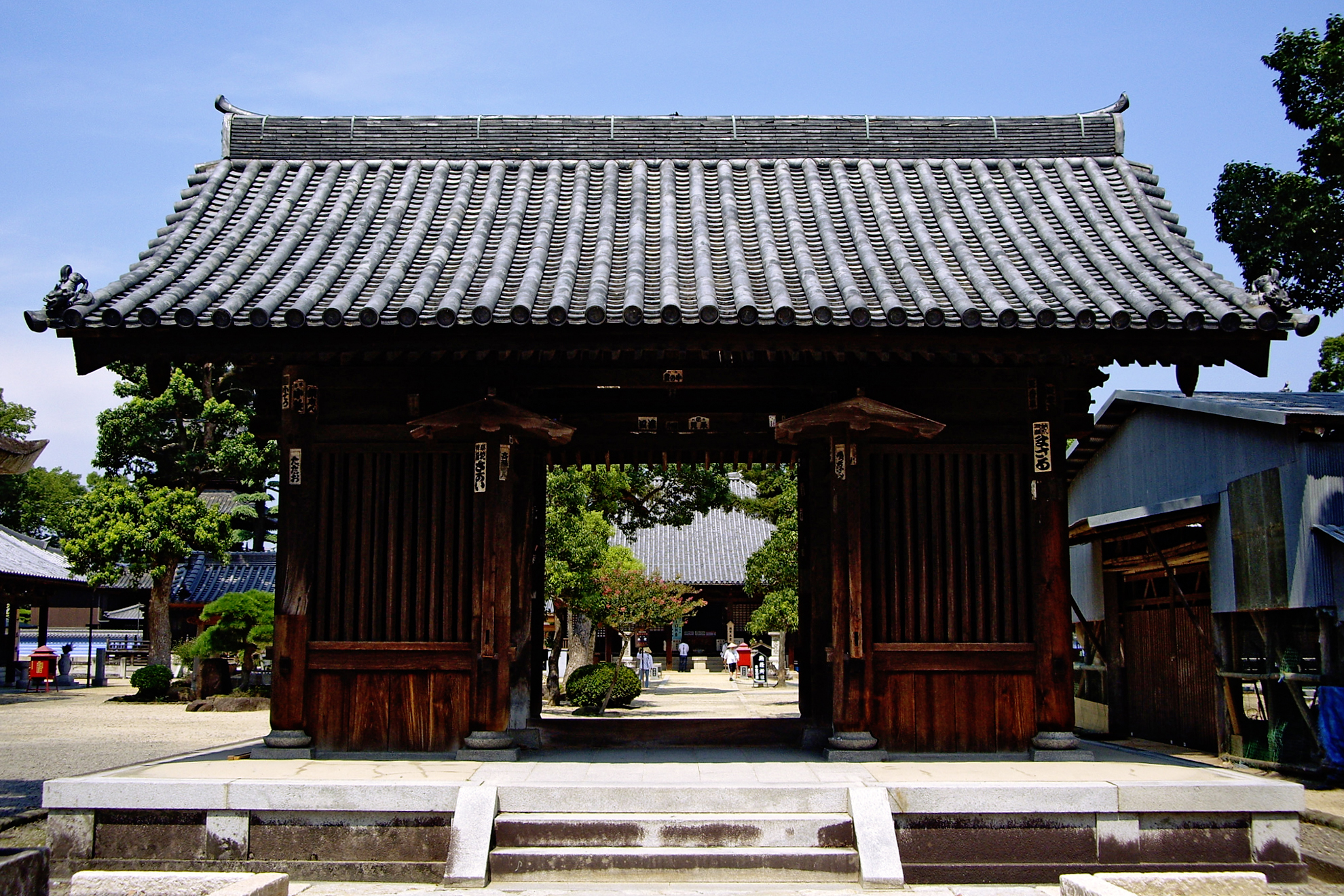 本山寺仁王門 - 日本国香川県三豊市